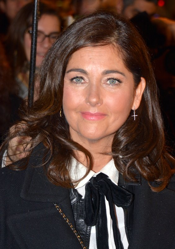 Cristiana Reali à la cérémonie des Globes de cristal